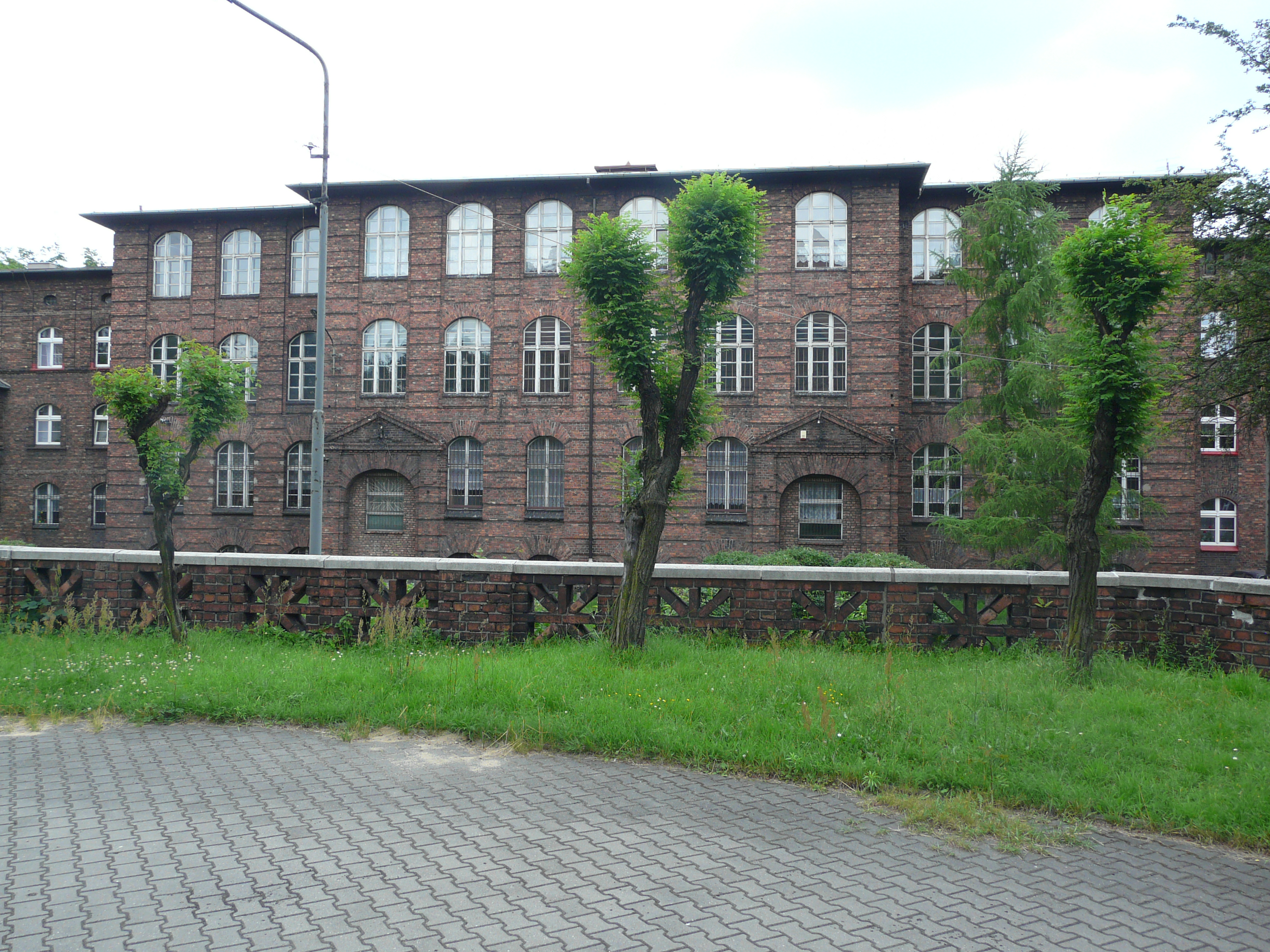 Janów-Nikiszowiec, Katowice